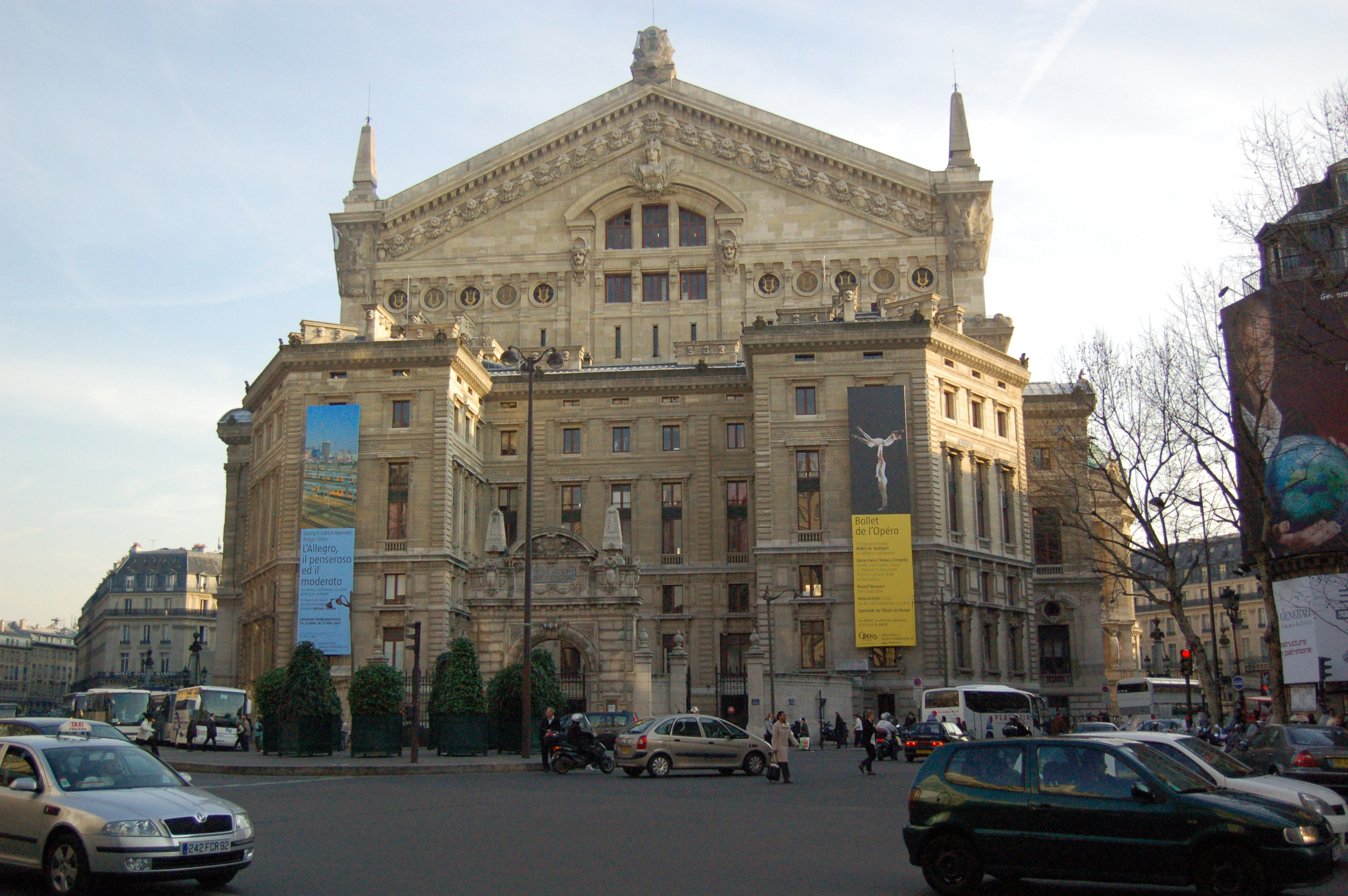 Vue de l'opéra Garnier depuis le boulevard Haussmann